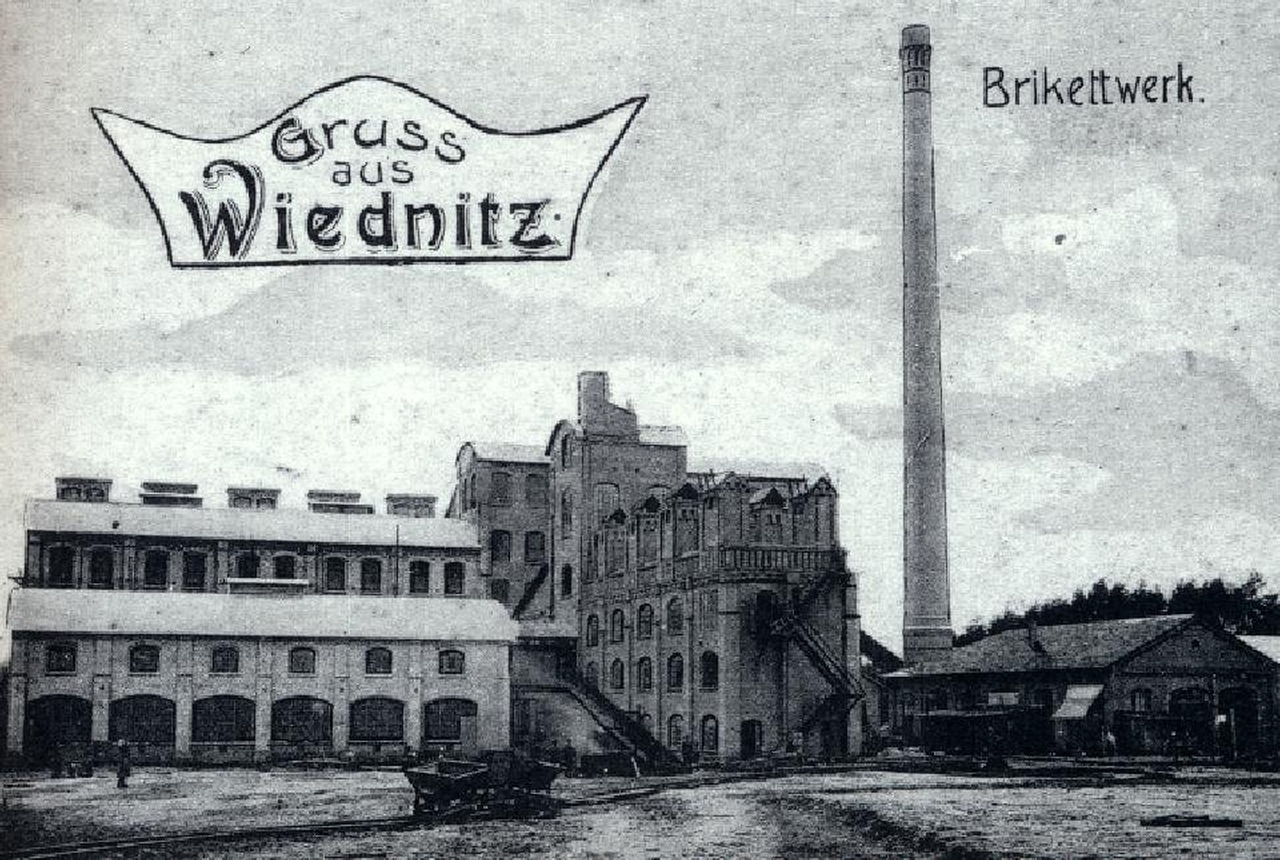 Wiednitz, ehem. Brikettwerk um 1900, abgebrochen